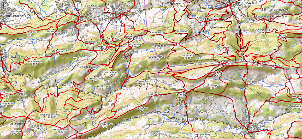 Karte der Wanderwege im Passwang-Gebiet